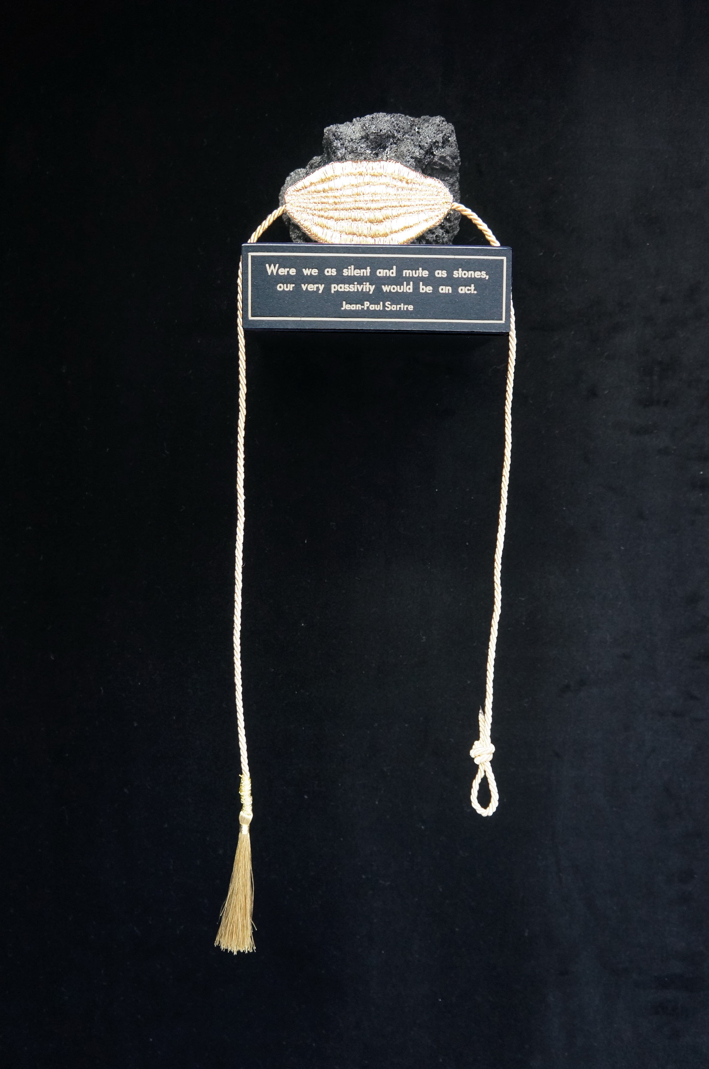 Karina Marusińska, "Cisza", 2017, instalacja, kamień, tkanina, elementy pasmanteryjne, drewno, papier, 12 x 10 x 35 cm, fot. Karina Marusińska